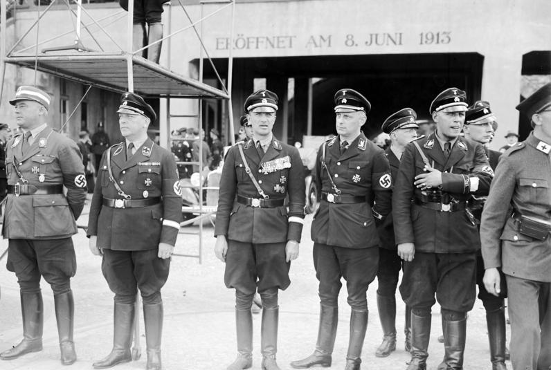 SS. Stabsführer in der Mitte mit Kreuz (X) Prinz Waldeck